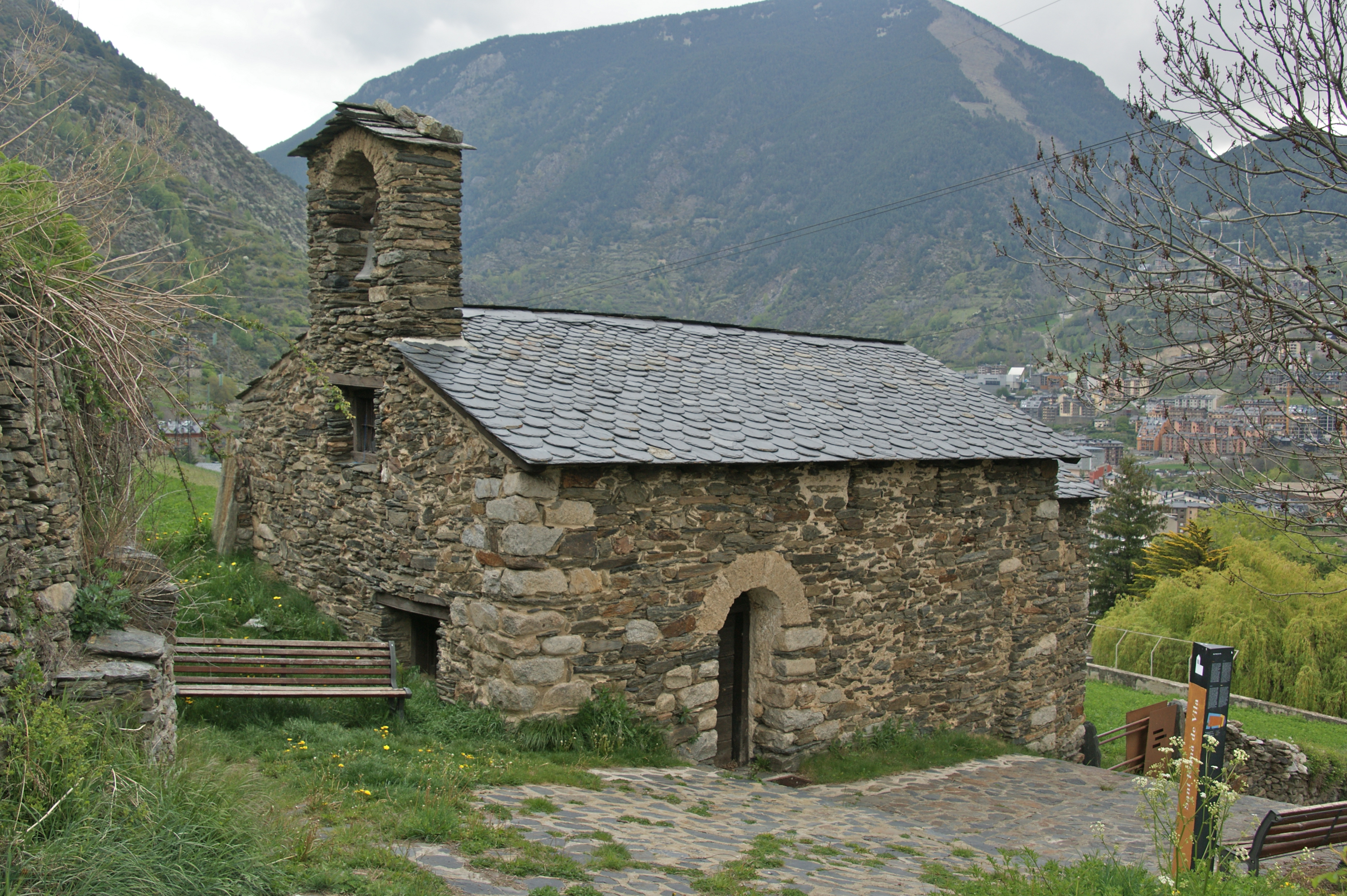 Església de Sant Romà de Vila